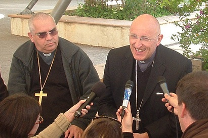 Nosseigneurs Dominique Rey (droite) et Jean-Pierre Cattenoz (gauche) lors d'une conférence de presse.